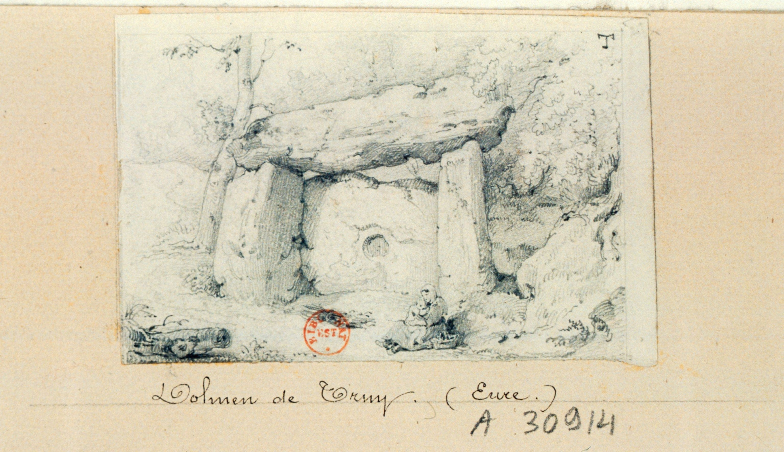 Dolmen de Trie-Château (Oise) : dessin